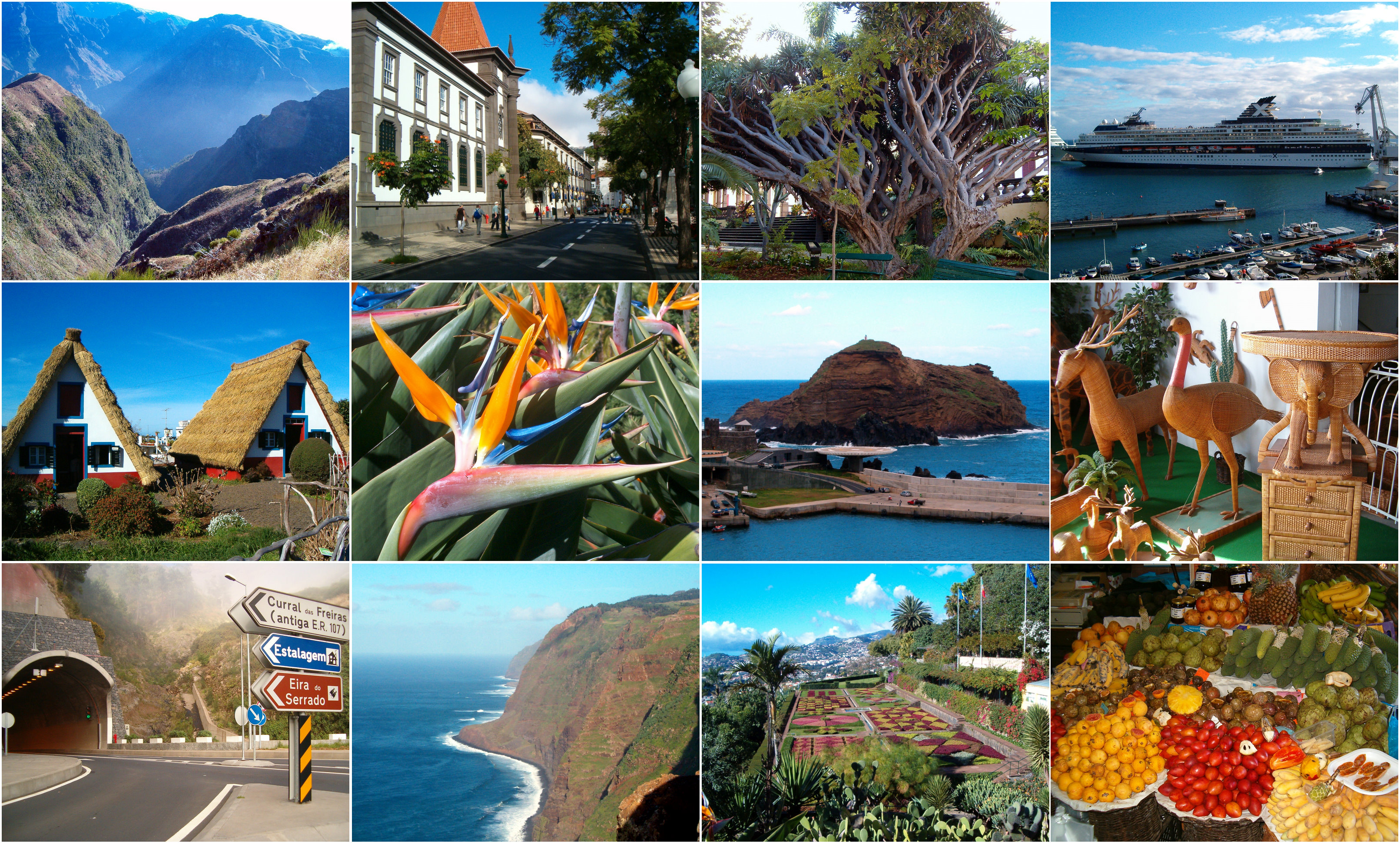 Ilha da Madeira, colagem das 12 fotografias tiradas em Dezembro de 2006